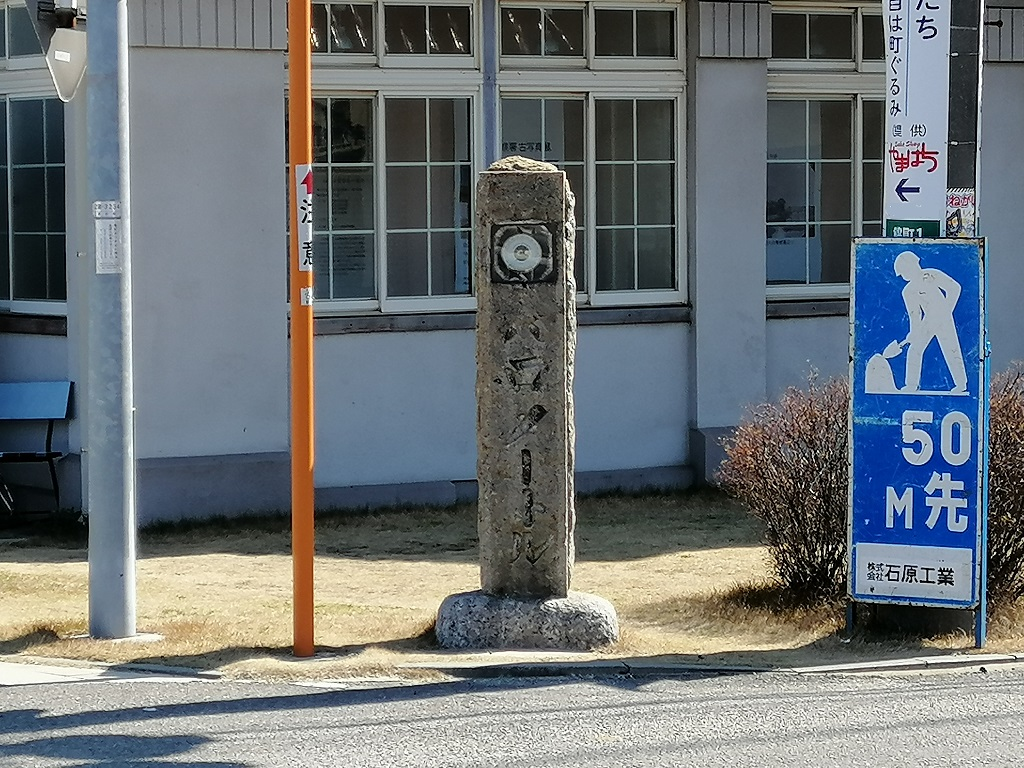 旧大浜警察署とバロメートル（気圧計）